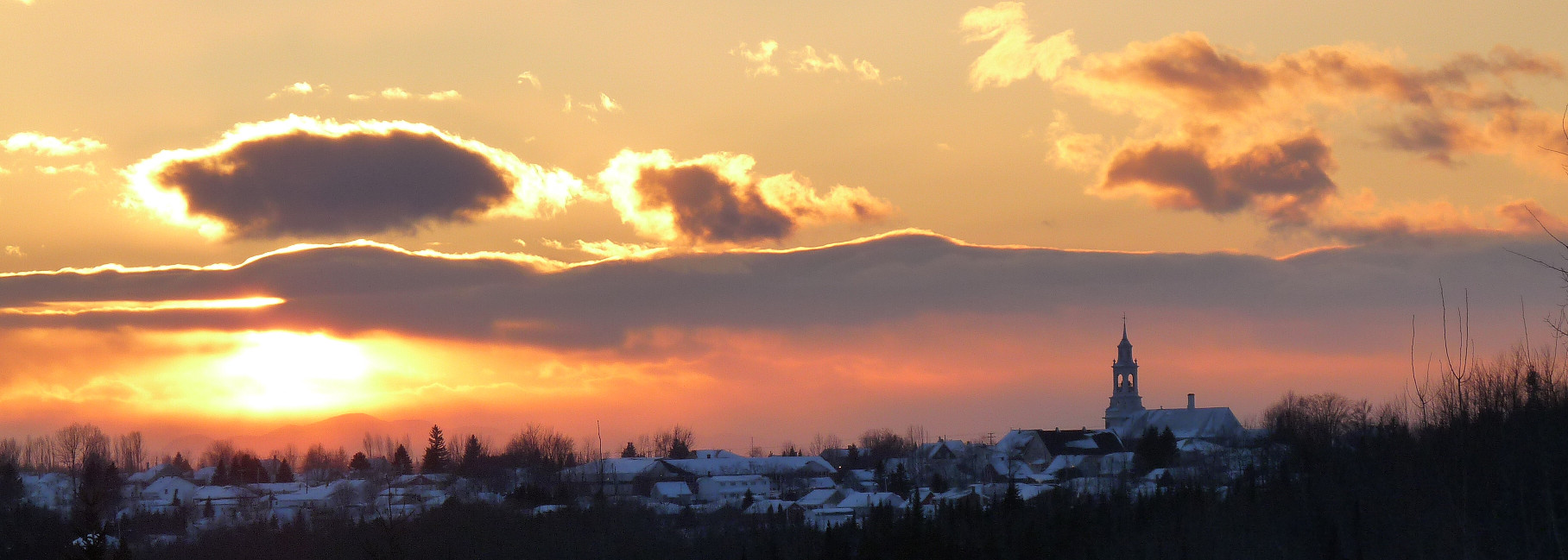 Village de Saint-Antonin, dans le Bas-Saint-Laurent (Québec) vu du 3e rang.